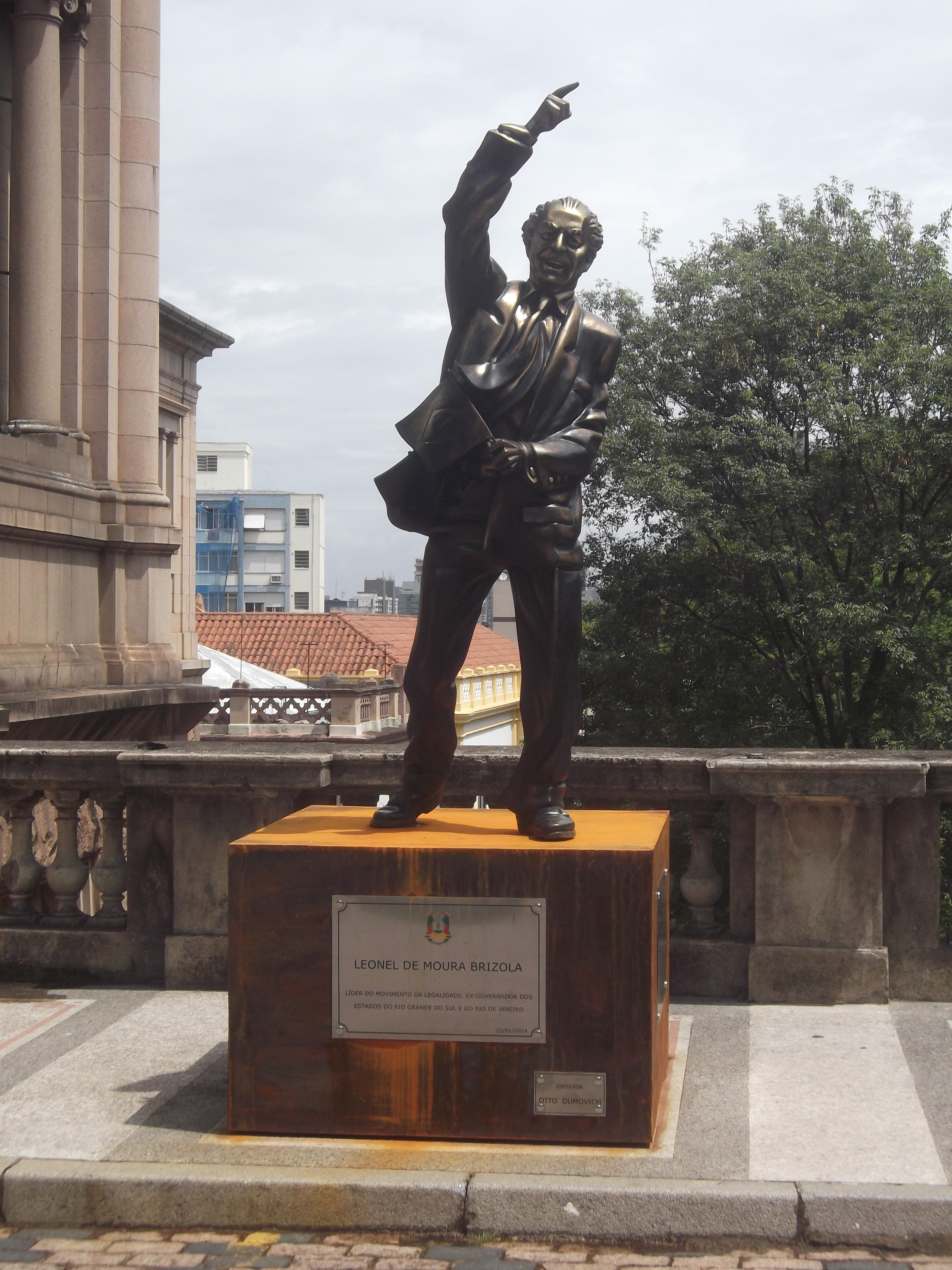 Estátua de Leonel Brizola - Otto Dumovich, 2014 - Porto Alegre - Palácio Piratini